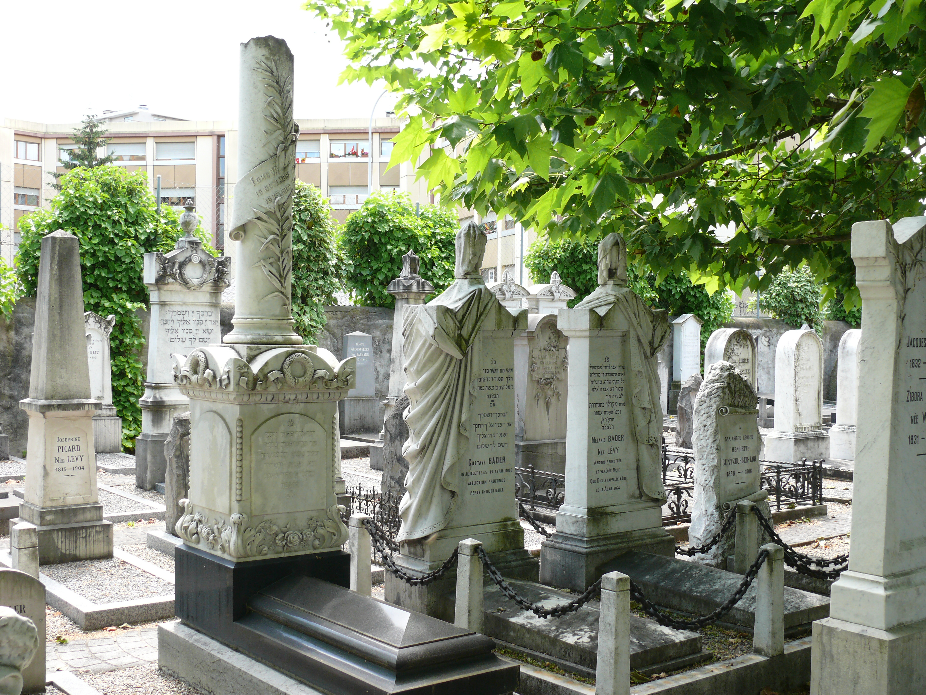 Détail de la parcelle de 1874 du cimetière juif de Carouge